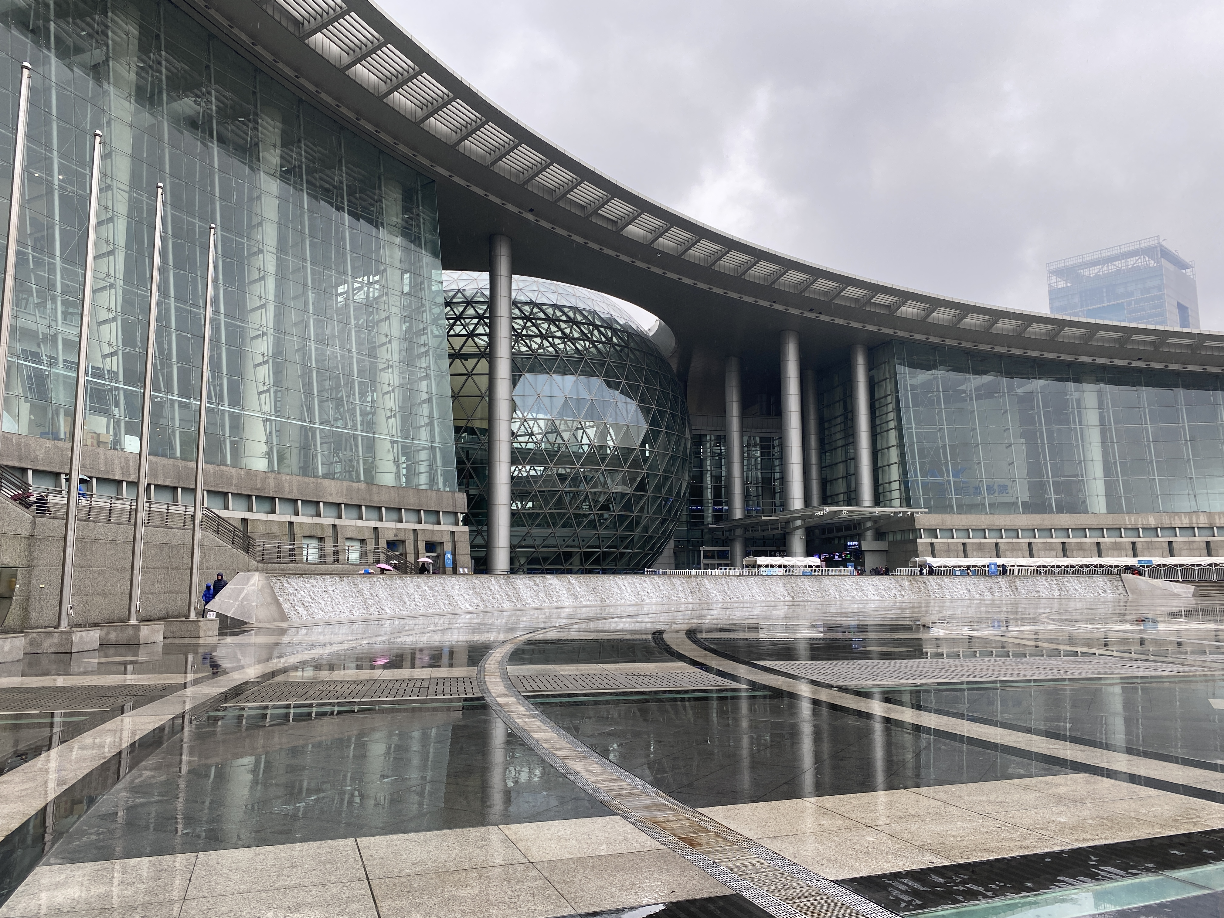 上海科技馆。2019年